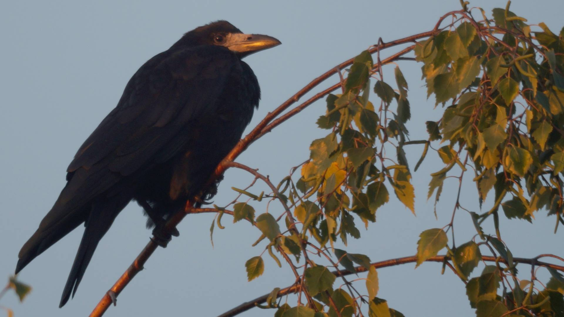 Künnivares Tartus päikeseloojangut vaatamas.